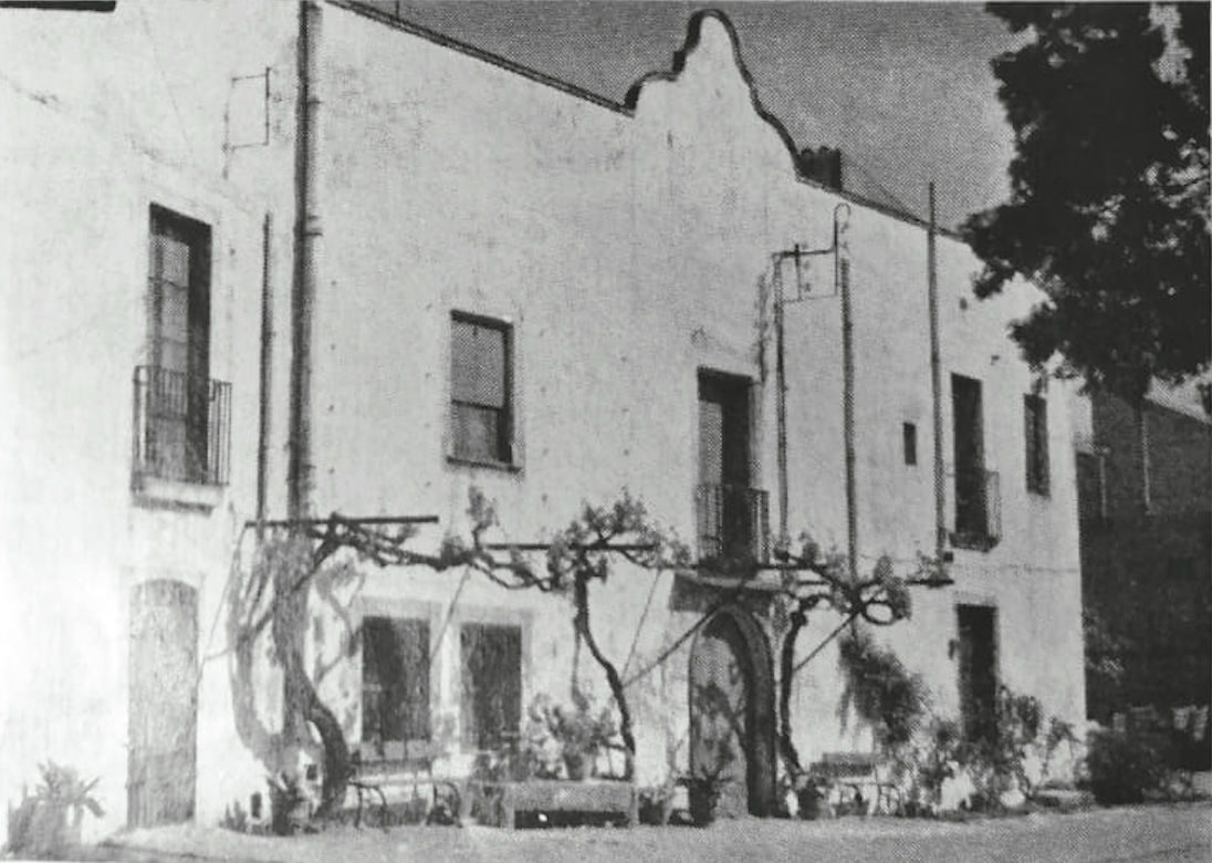 Façana frontal de la desapareguda Can Peixo (també coneguda com a Hisenda o Gol de Can Serra) durant els anys 70 a Cornellà de Llobregat.